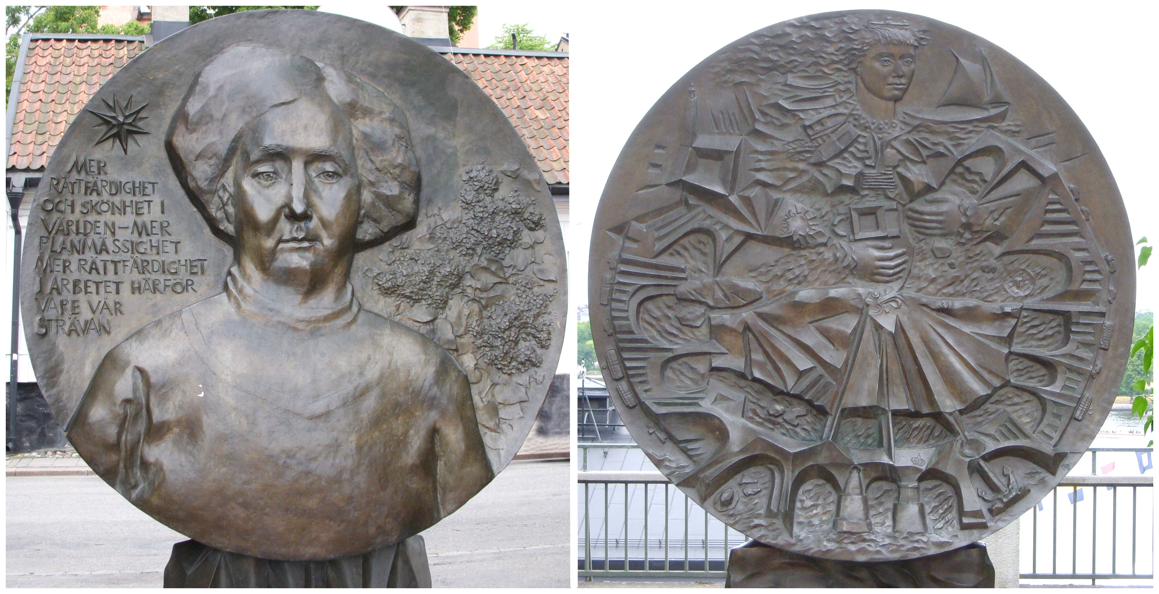 Anna Lindhagen, skulptur (båda sidor) av Kerstin Kjellberg-Jacobsson, Fjällgatan Stockholm